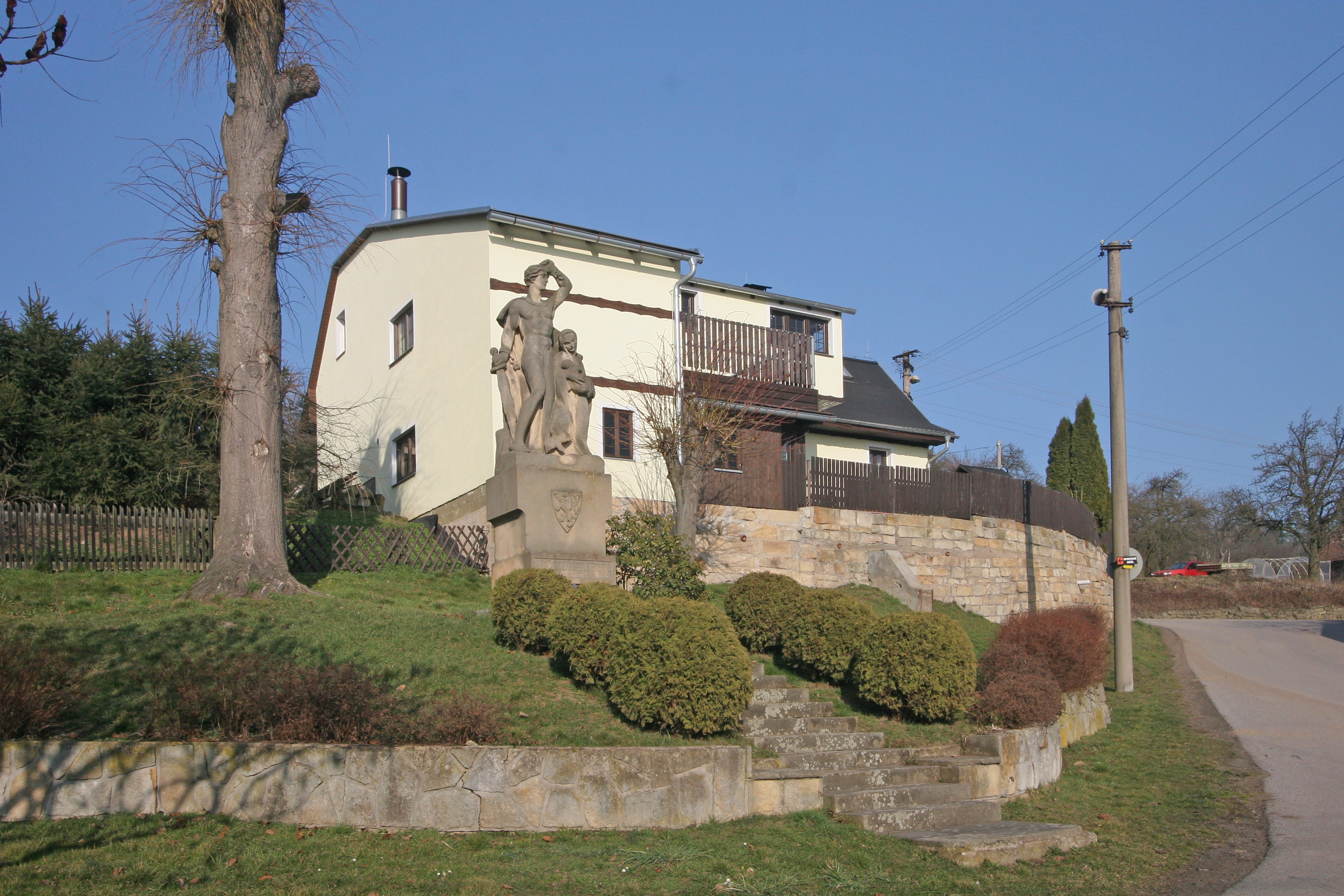 Podhorní Újezd pomník padlých